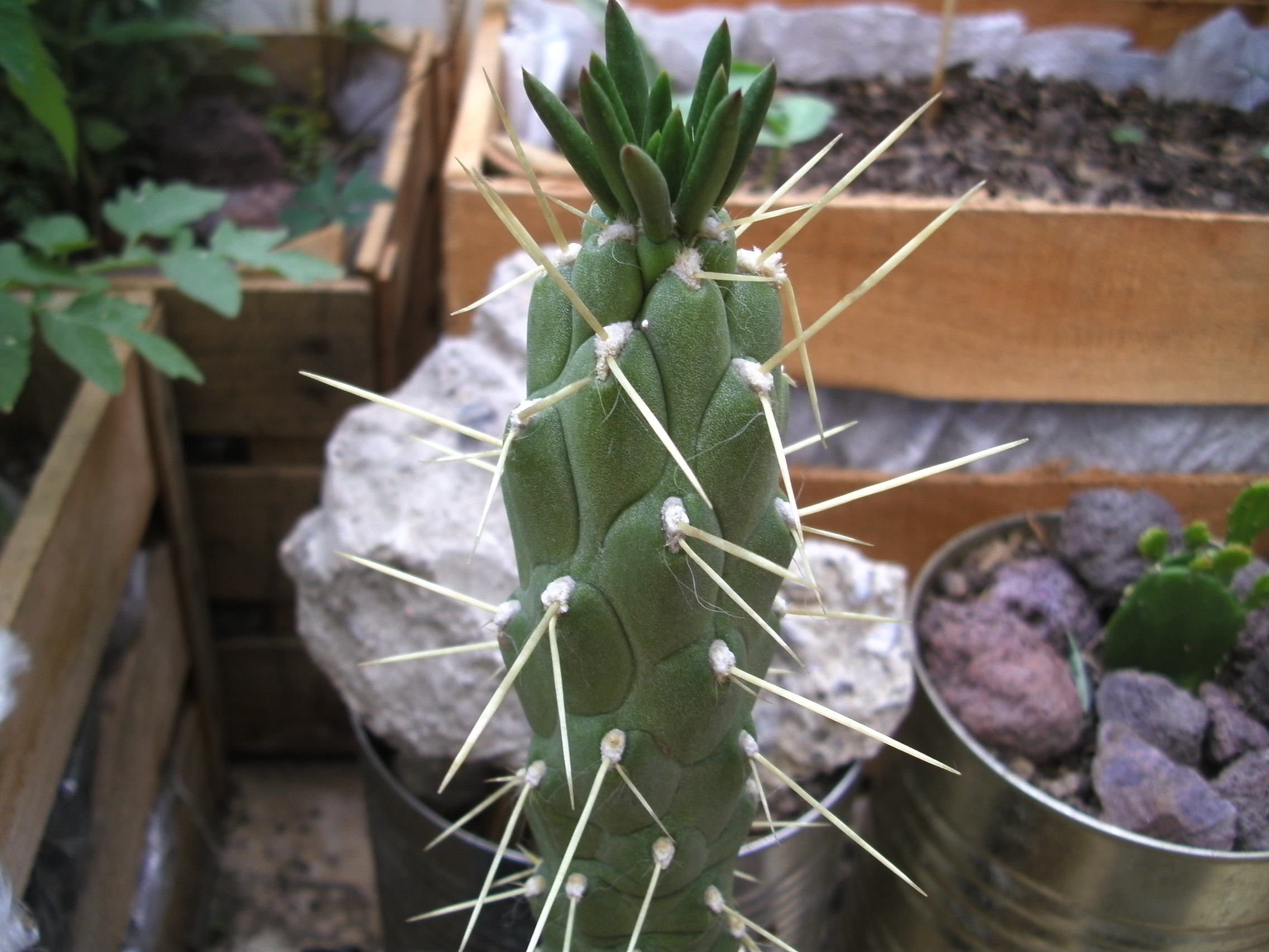 Dettaglio di una giovane Austrocylindropuntia subulata coltivata in vaso in Mexico. Si possono osservare le notevoli spine e le foglie in cima alla pianta. Dettaglio di una giovane Austrocylindropuntia subulata coltivata in vaso in Mexico. Si possono osservare le notevoli spine e le foglie in cima alla pianta.